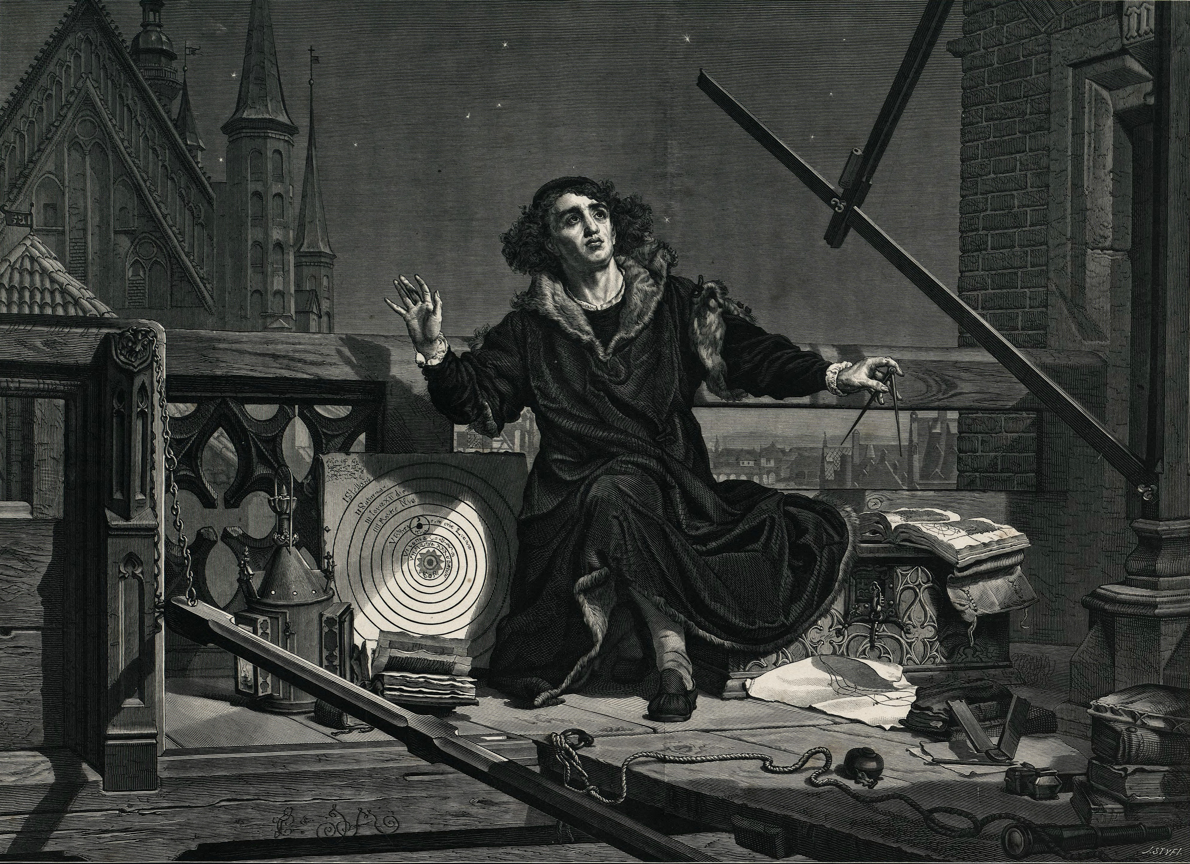 Mikołaj Kopernik